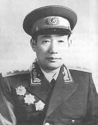 杜平中将1955年授衔照